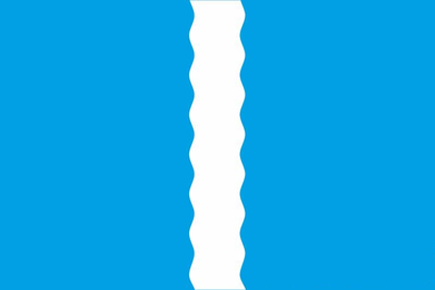 Прапор села Барабой